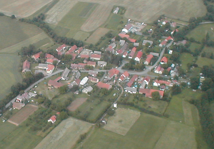 Svinařov v roce 2006